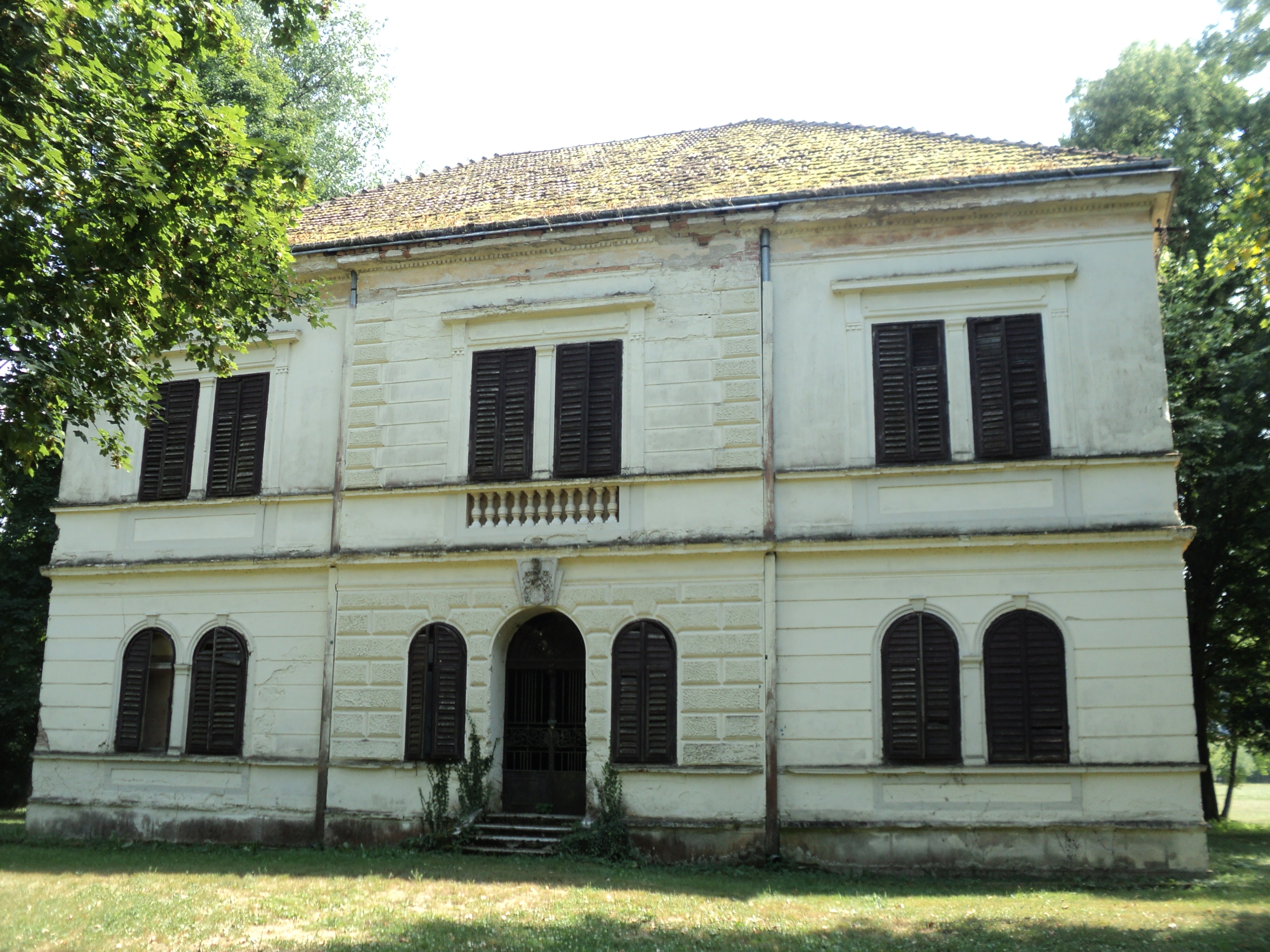 Prednja strana dvorca Türk - Mažuranić u Gornjem Pokupju, Karlovačka Županija.